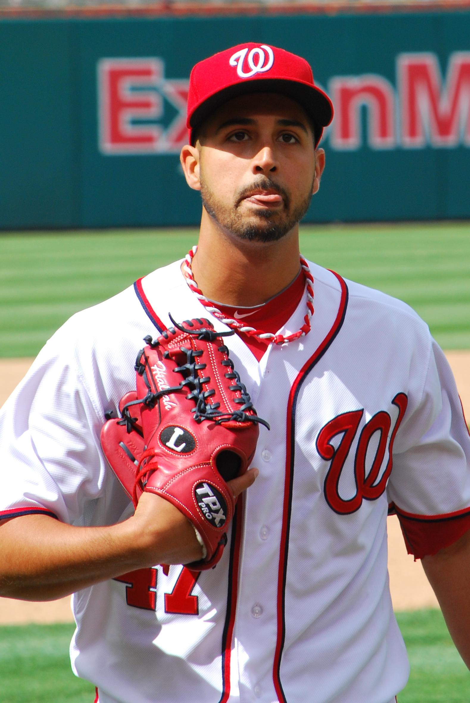 Gio Gonzalez